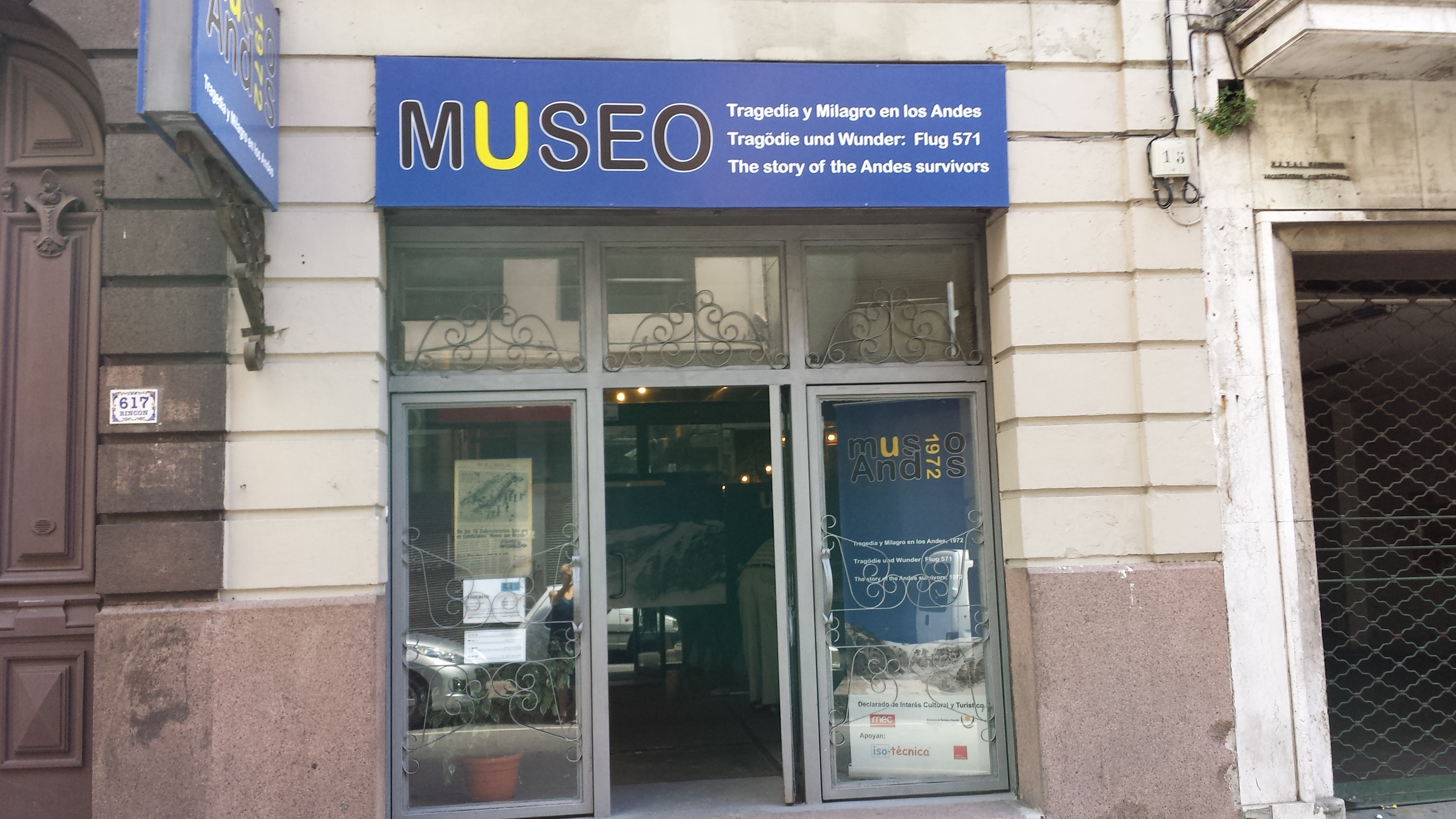 Fachada del Museo Andes 1972, sito en Rincón 619, entre calles Juan Carlos Gómez y Bartolomé Mitre, Montevideo, Uruguay.